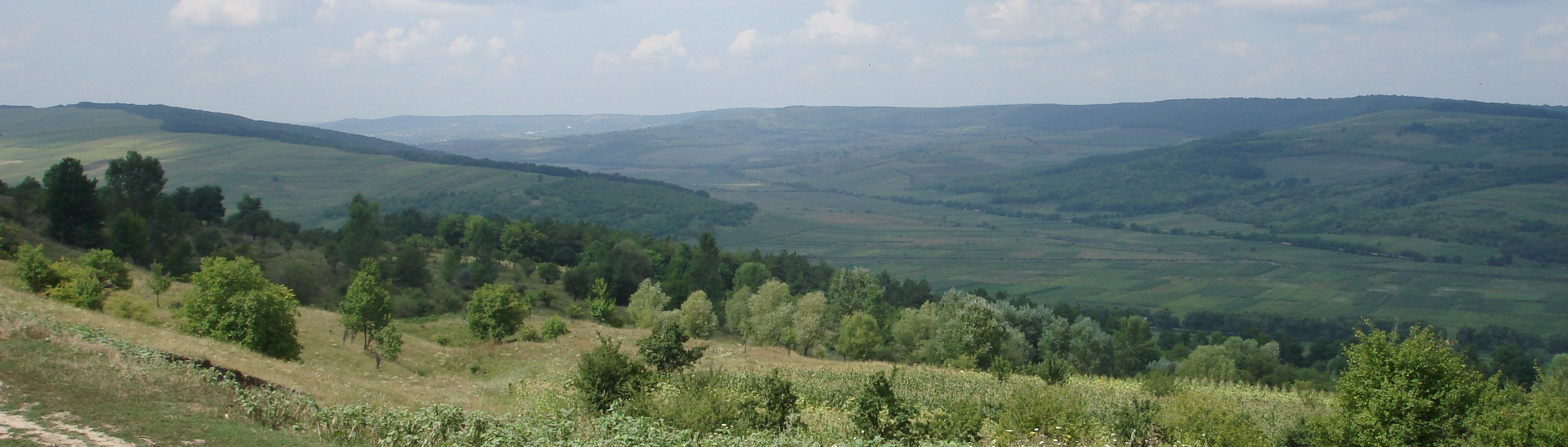 Пейзаж возле села Лозово Страшенского района Молдавии